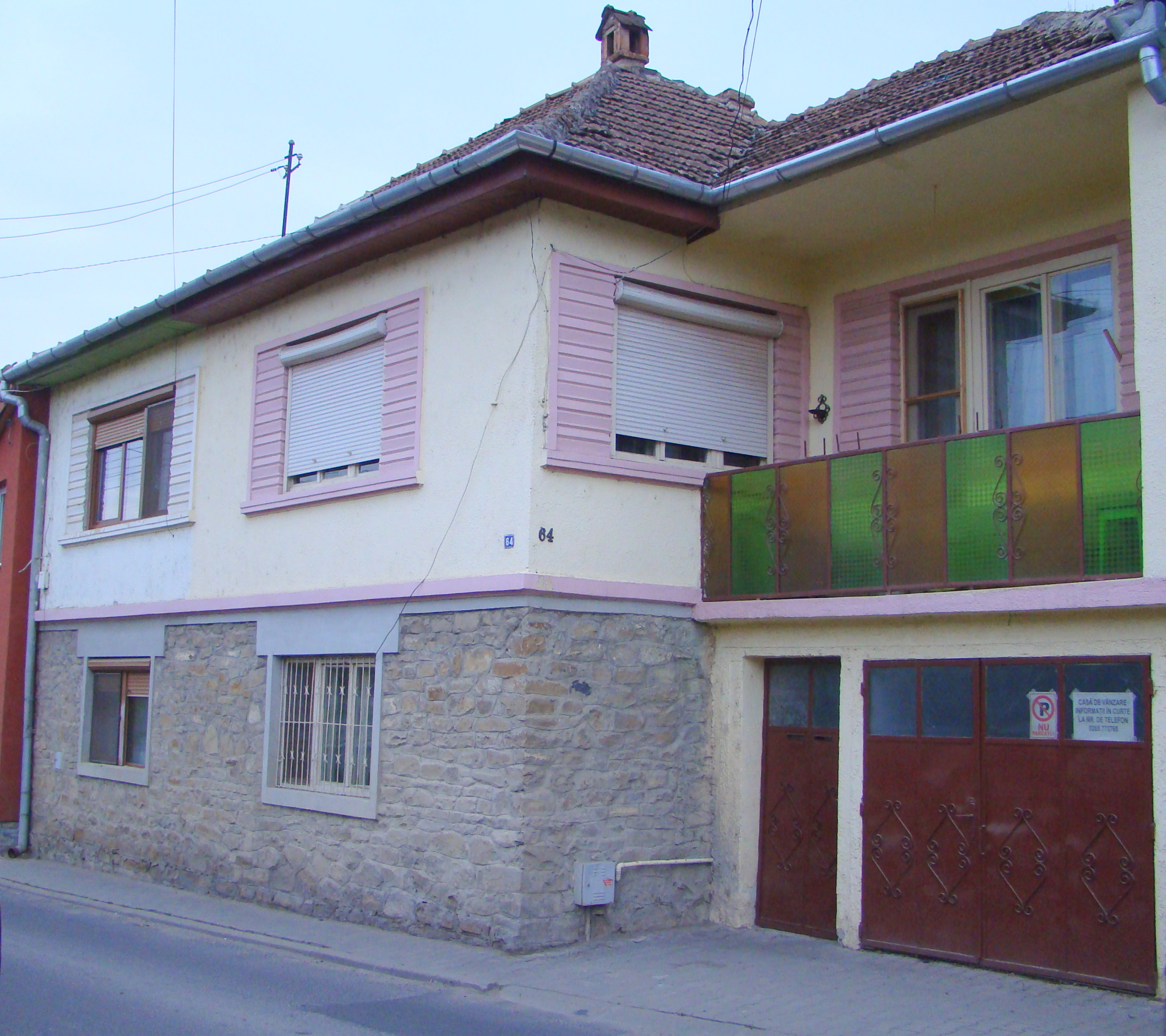 Casă, municipiul Sighișoara, str. Chendi Ilarie 64 1770